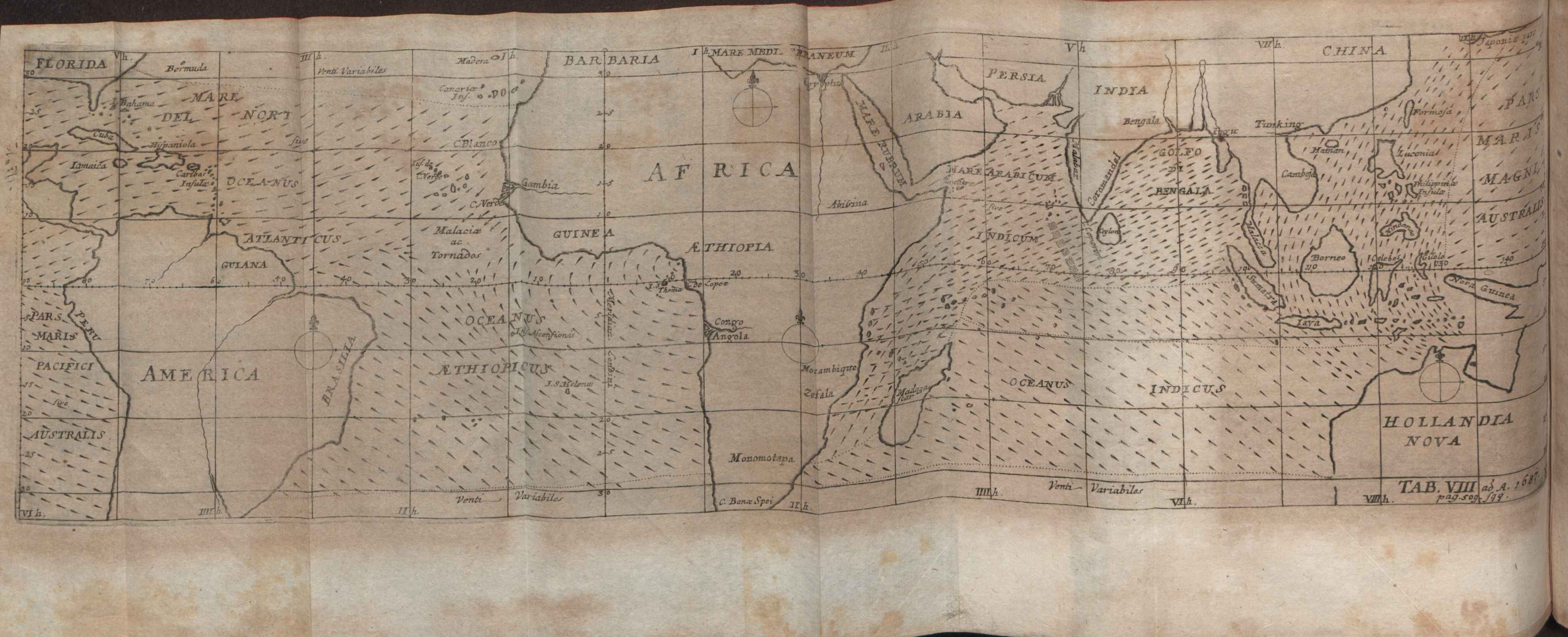 Illustration